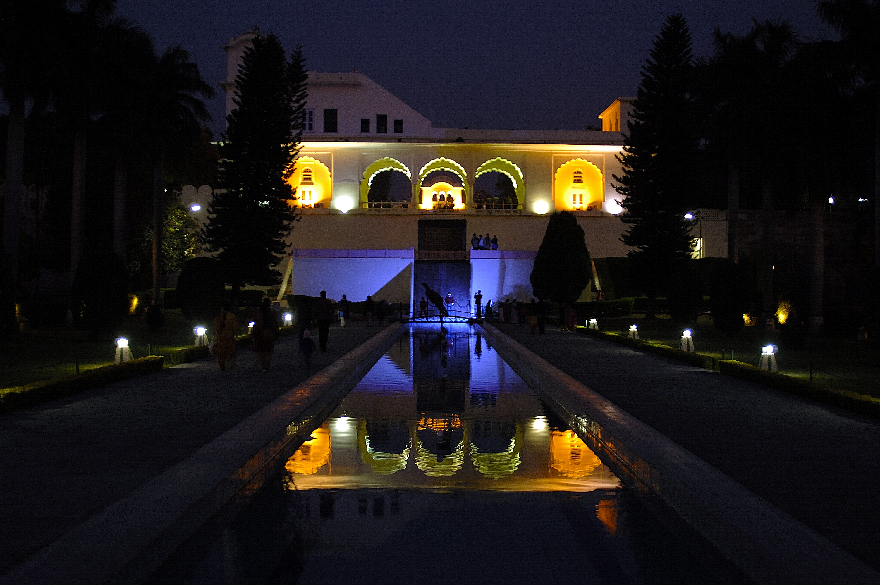 20071202_174811 pinjore_gardens_by_night